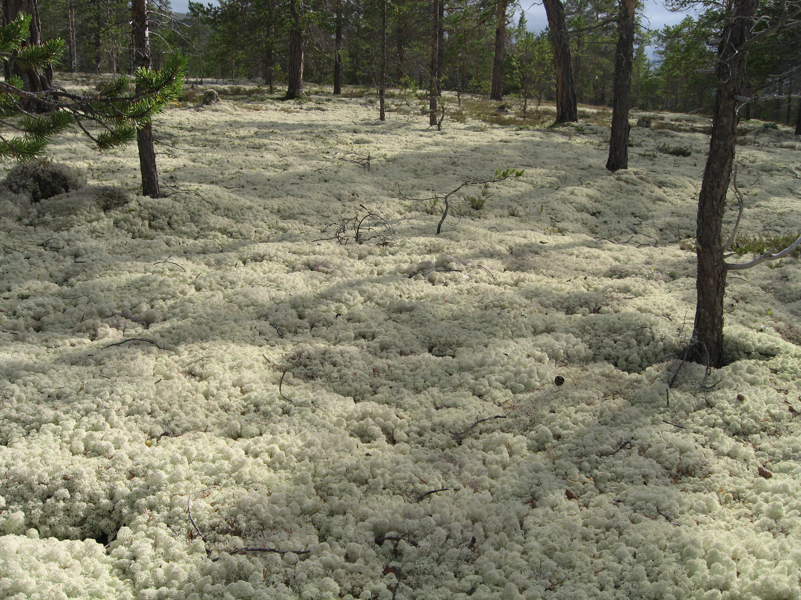 Kvitkrull - cladonia stellaris